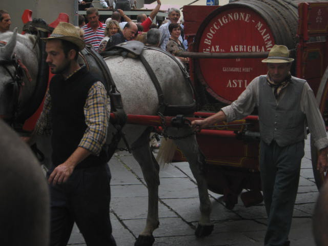 Sfilata delle Sagre This is a photo of a monument which is part of cultural heritage of Italy.